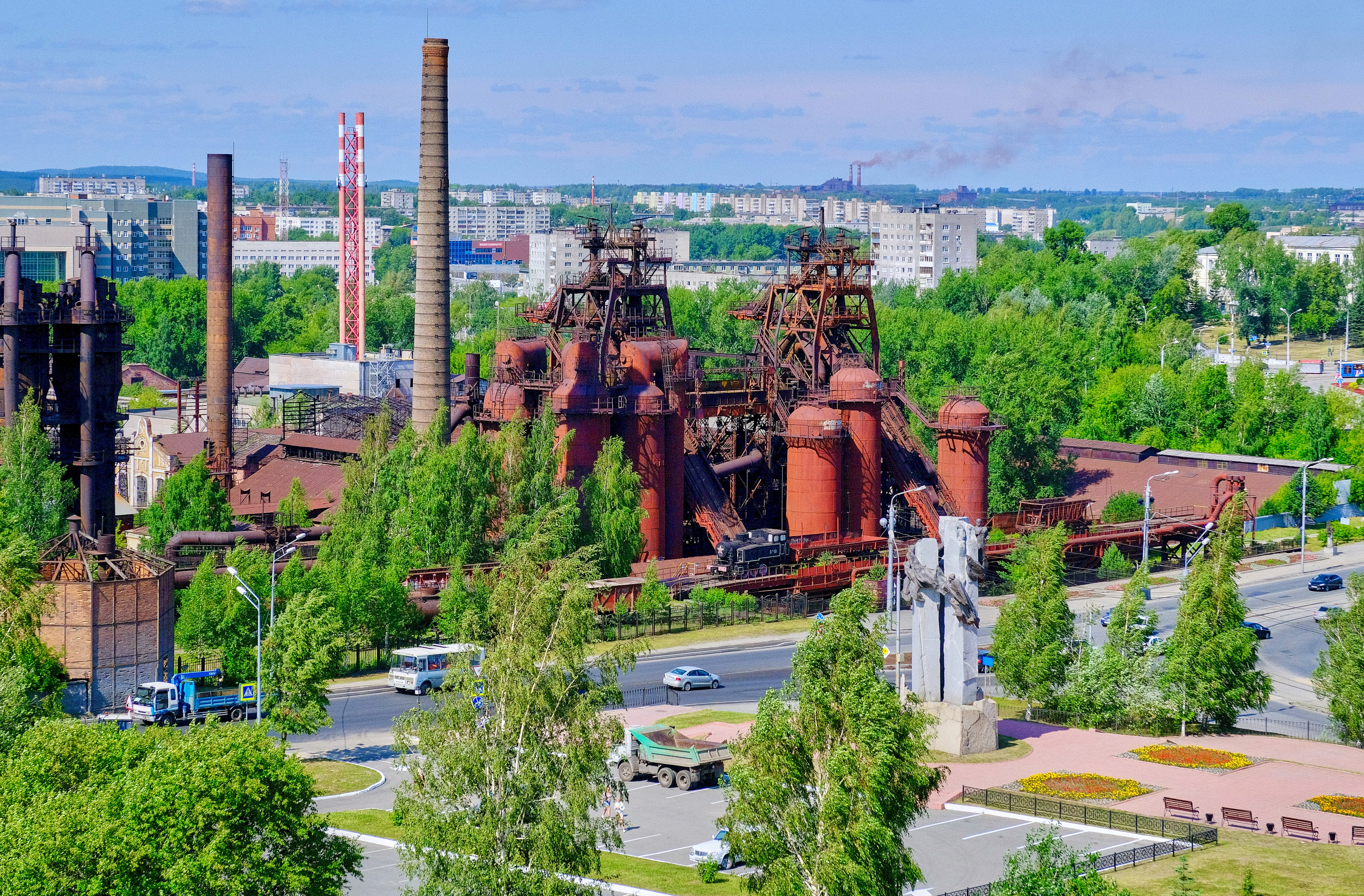 Вид с Лисьей горы на завод-музей истории горнозаводской техники и памятник тагильским металлургам в Нижнем Тагиле